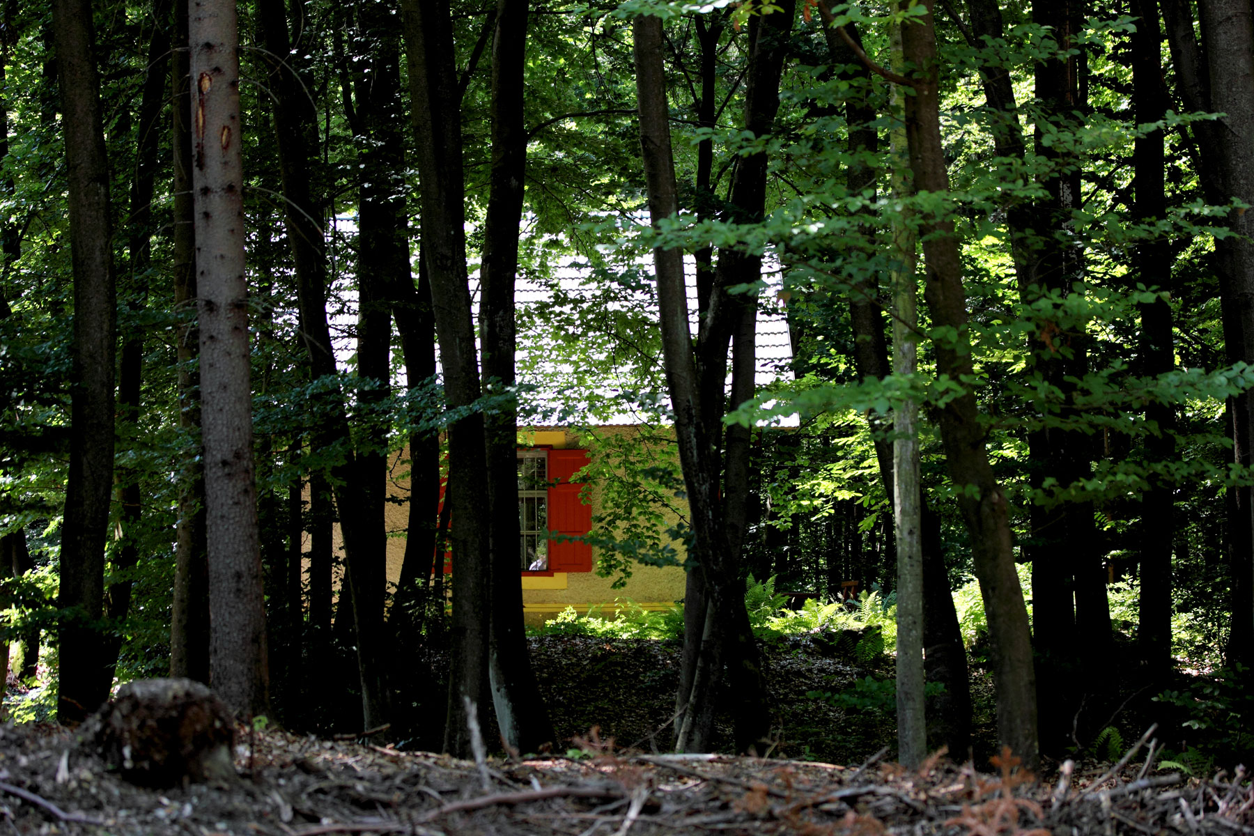 Gustav Mahlers "Komponierhäuschen" bei Maria Wörth.